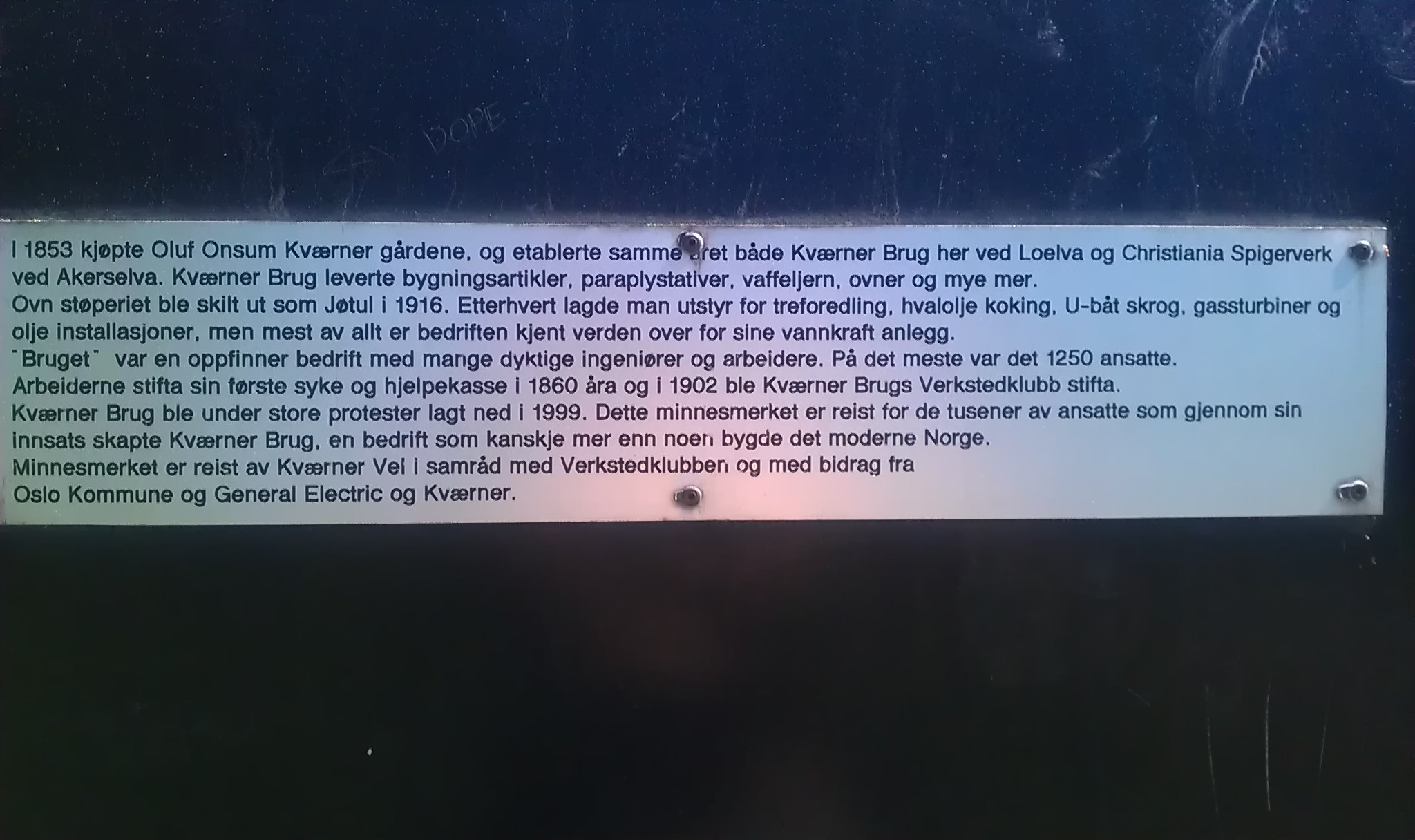 Minneplakett festet til monumentet av det blå løpehjulet stående i Svartdalsparken.